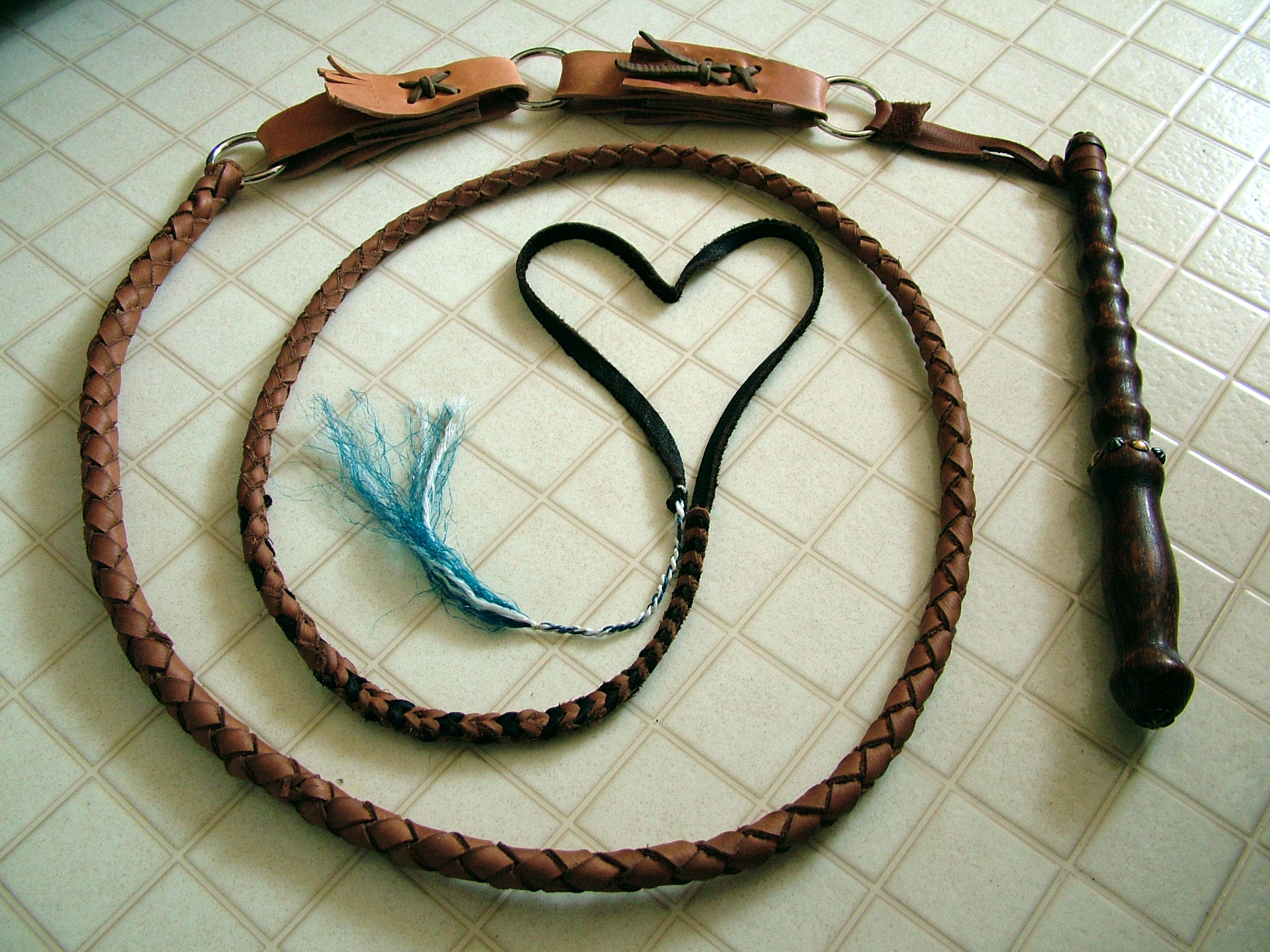 Pastiersky bič